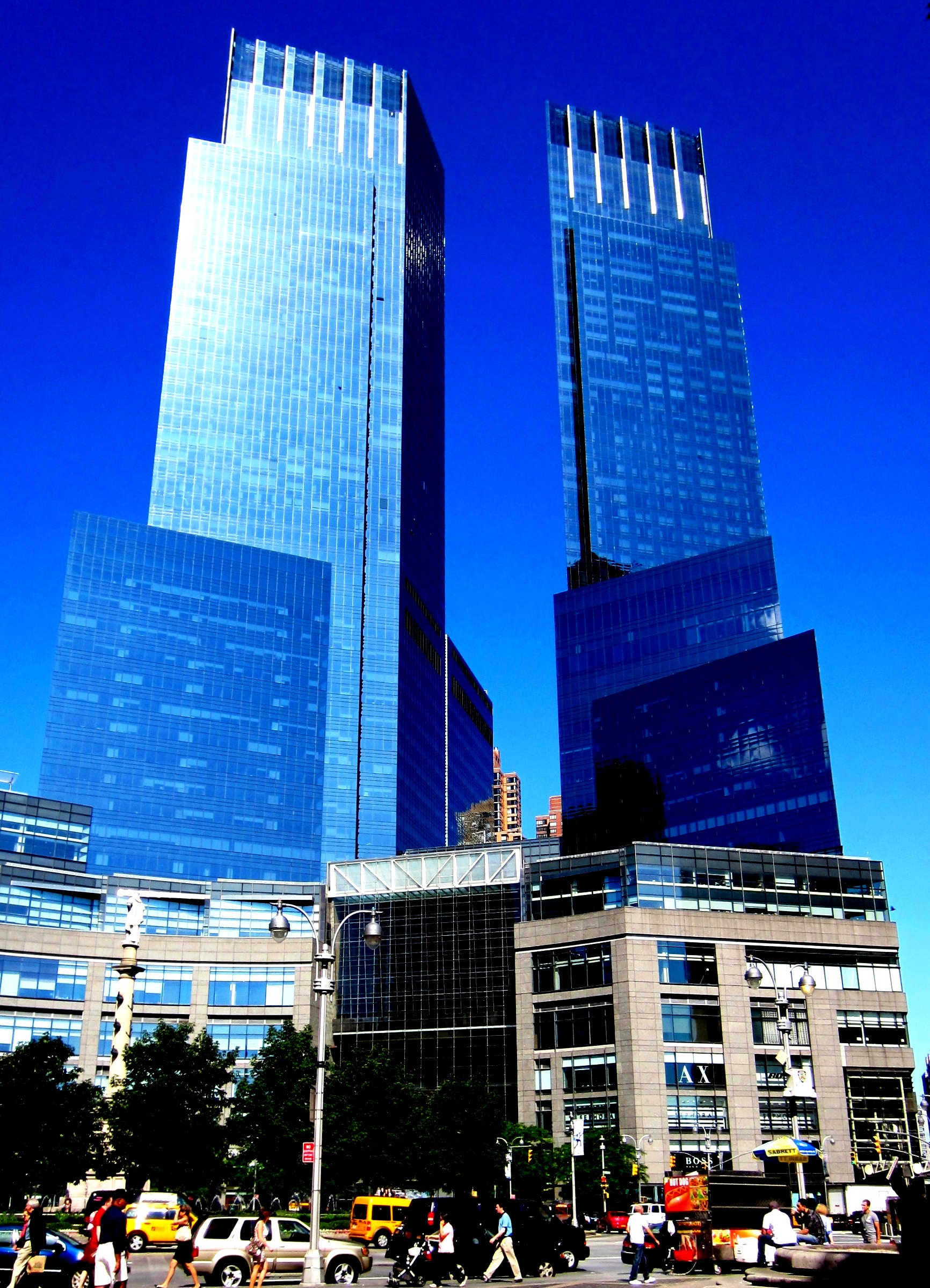 Das Time Warner Center mit seinen beiden markanten Türmen